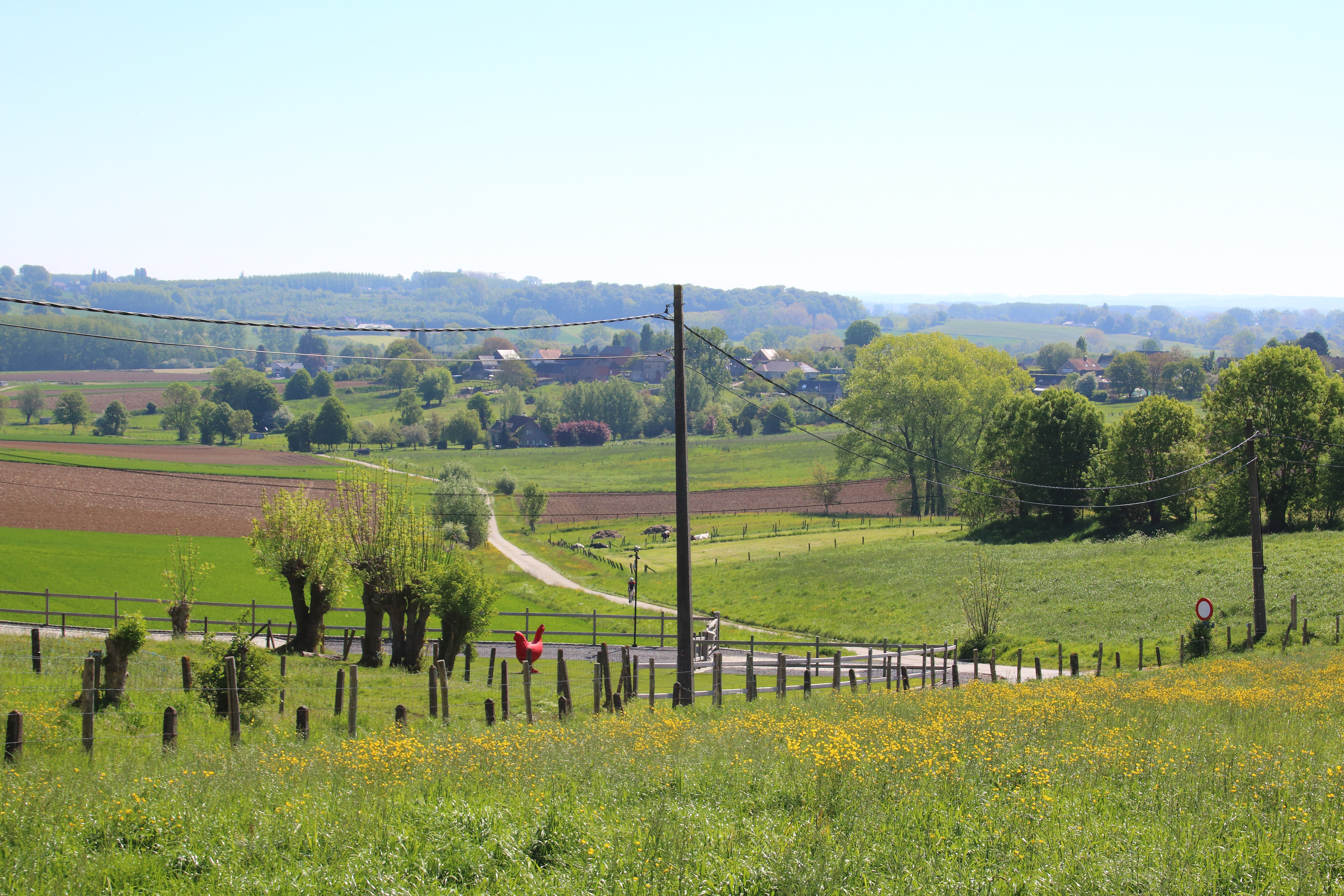 Vlaamse Ardennen, Twaalfbunderstraat, Brakel, Vlaanderen, België